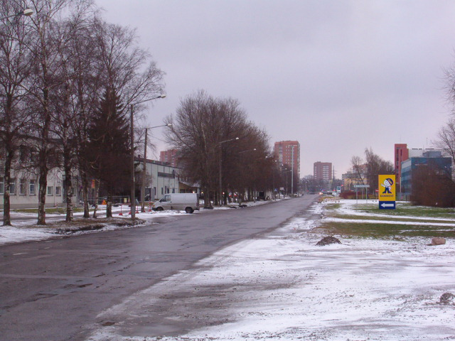 Laki I kvartal (Kadaka asum). Laki tänava äärsed äri- ja tootmishooned. Tallinn.